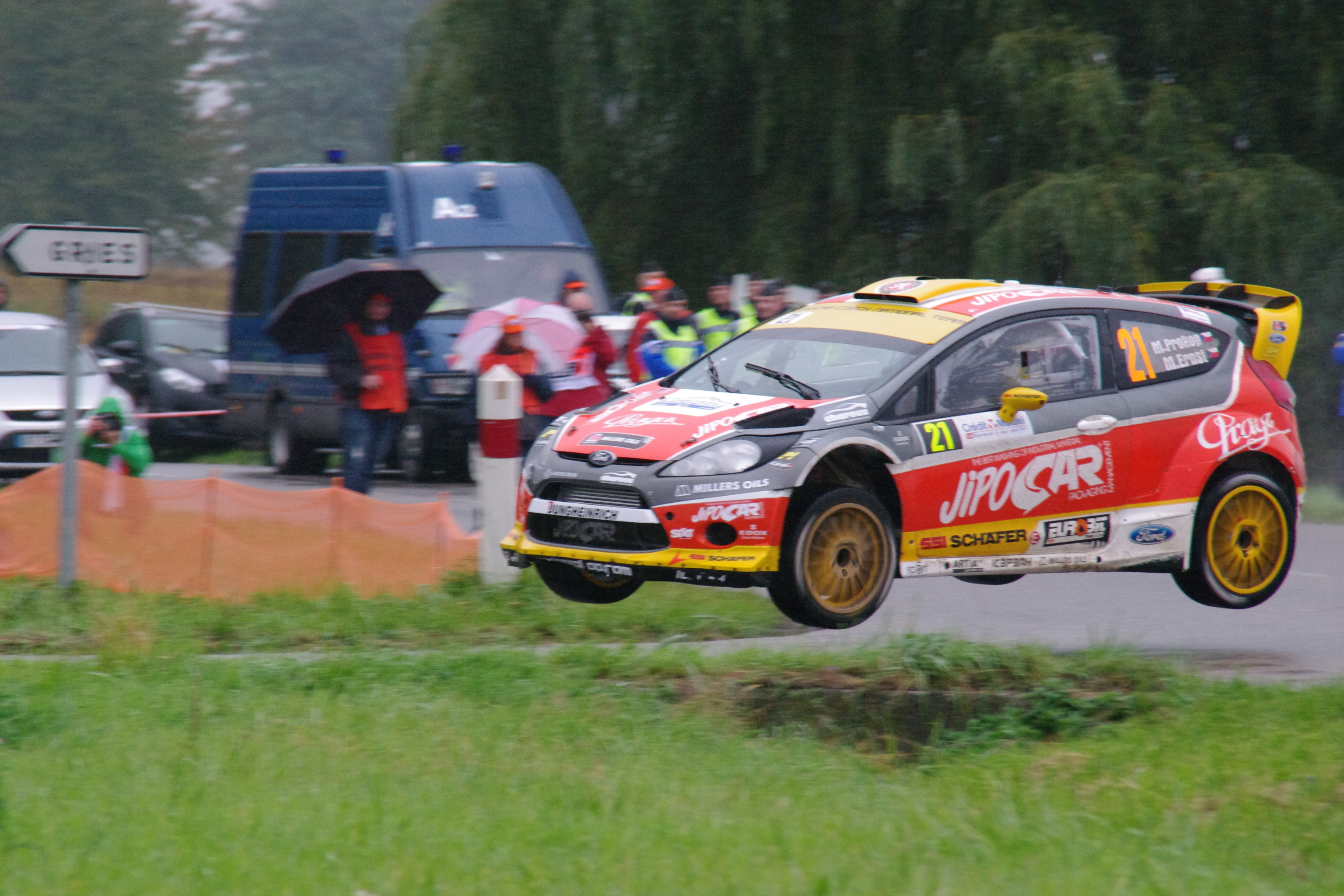 Martin Prokop - Rallye de France 2013